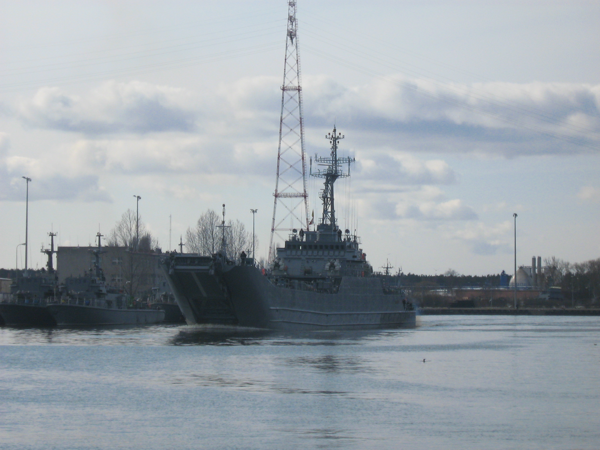 ORP Toruń.